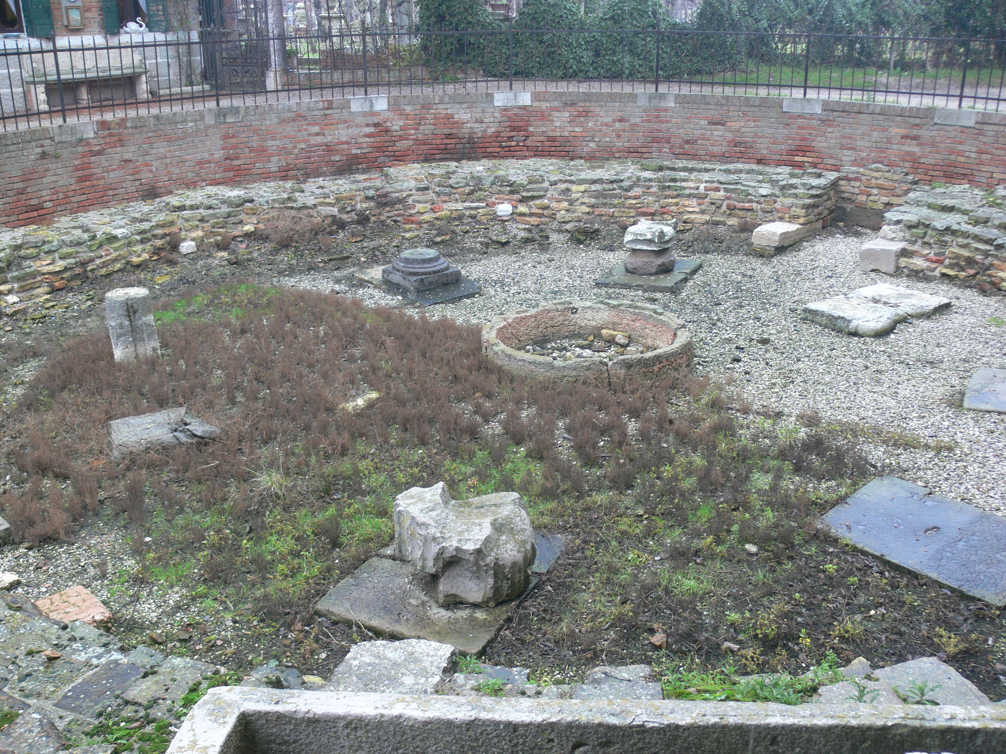 Cathédrale Sante Maria Assunta de Torcello, dans la lagune de Venise